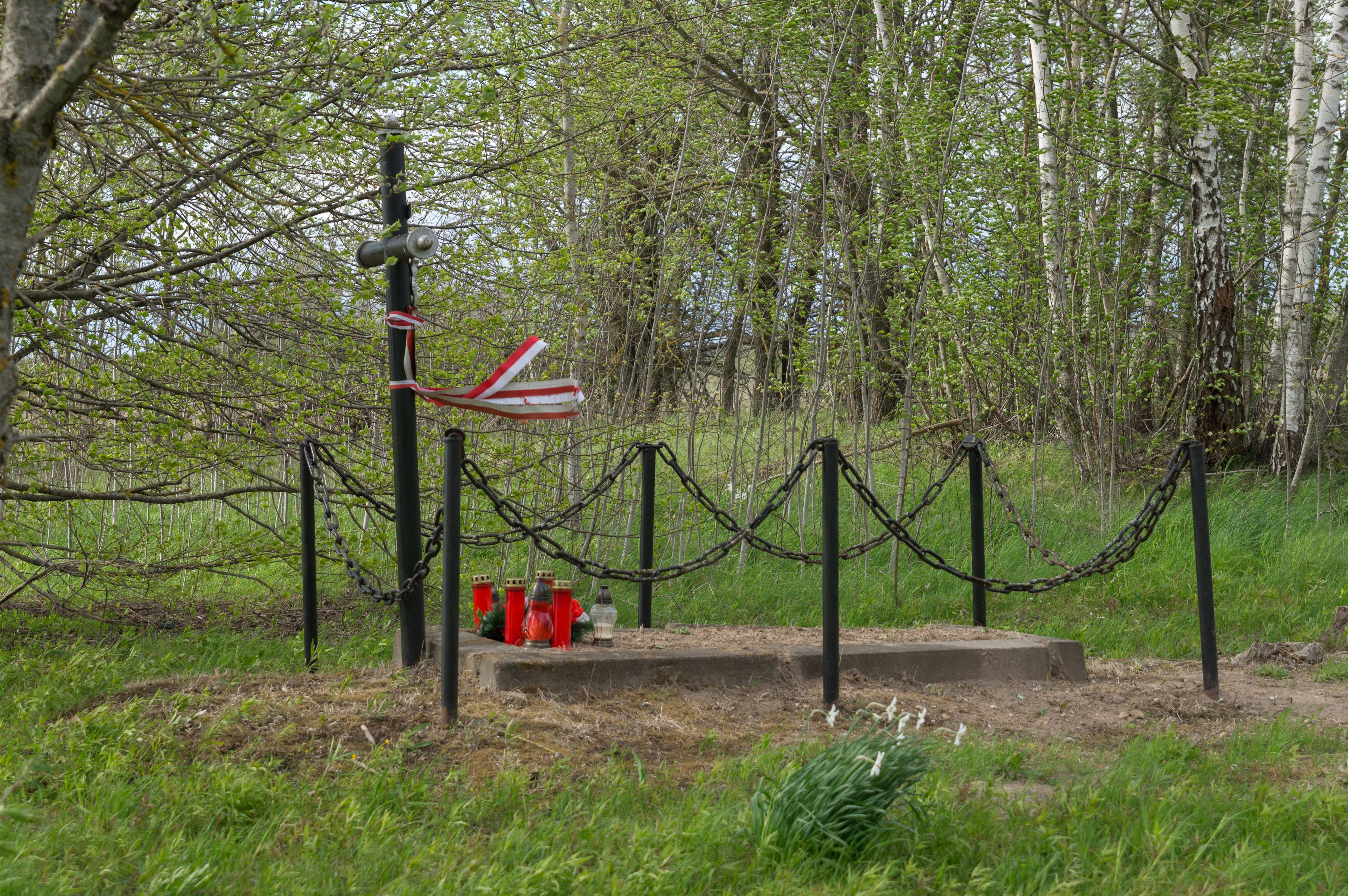 Магіла польскіх памежнікаў на месцы стражніцы.